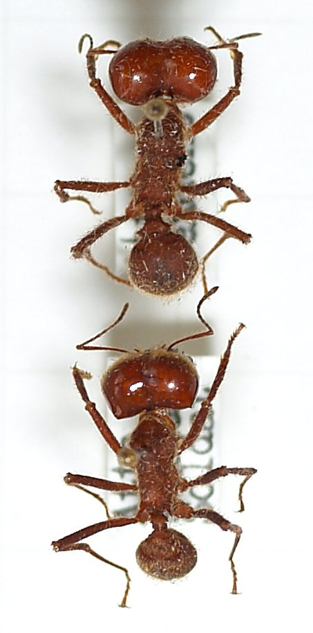 Atta sexdens soldiers.